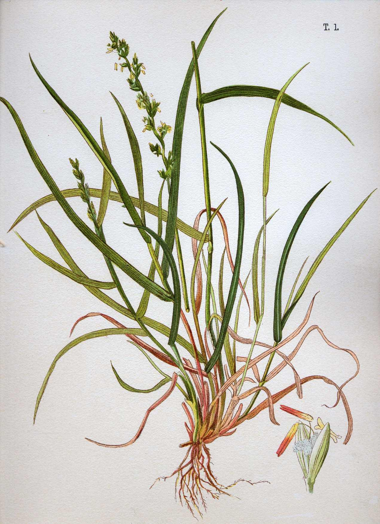 Райгасс английский (Lolium perenne) (пшонец, головолом)